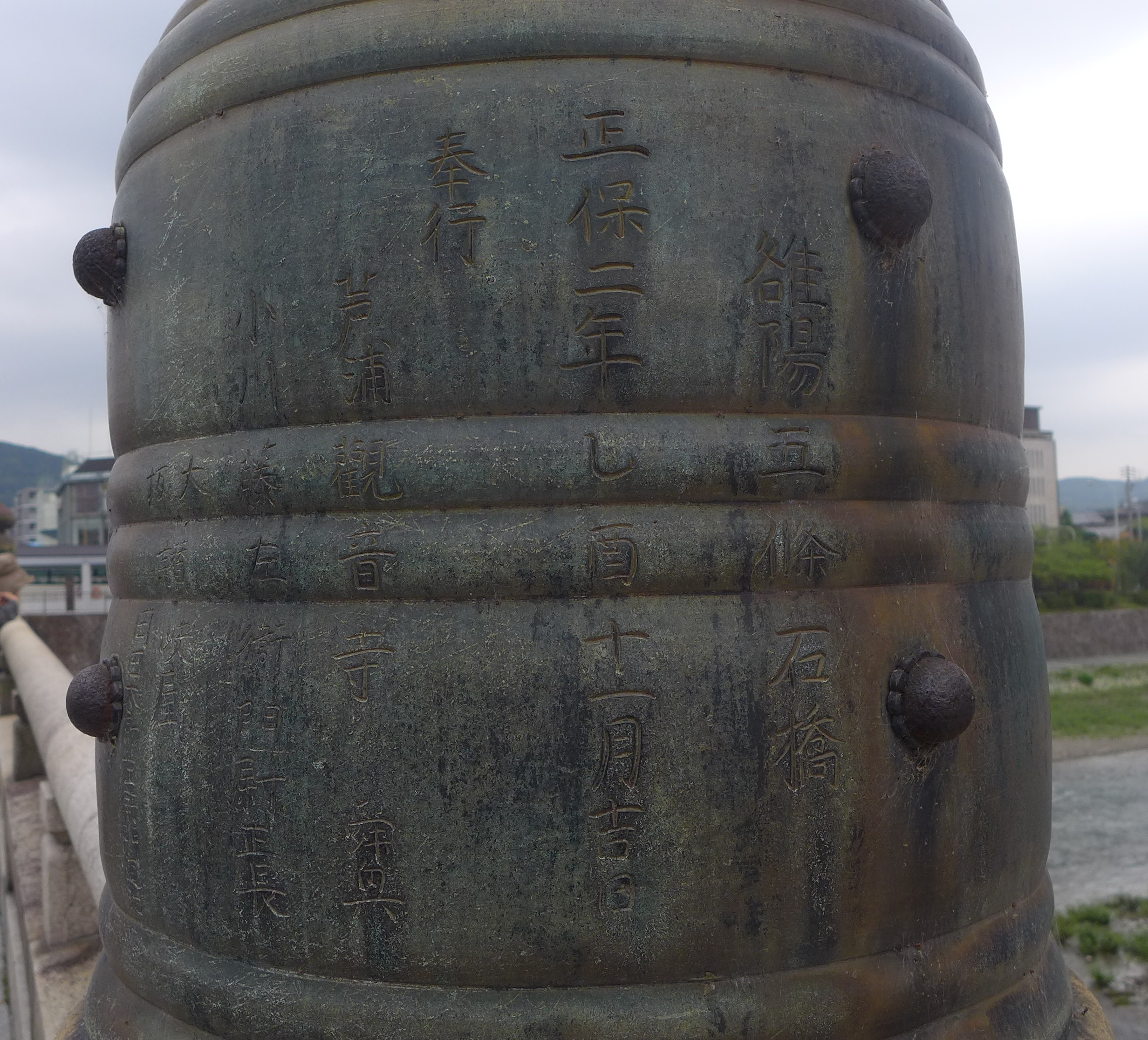 五条大橋の欄干にある擬宝珠。正保２年＝1645年と記載